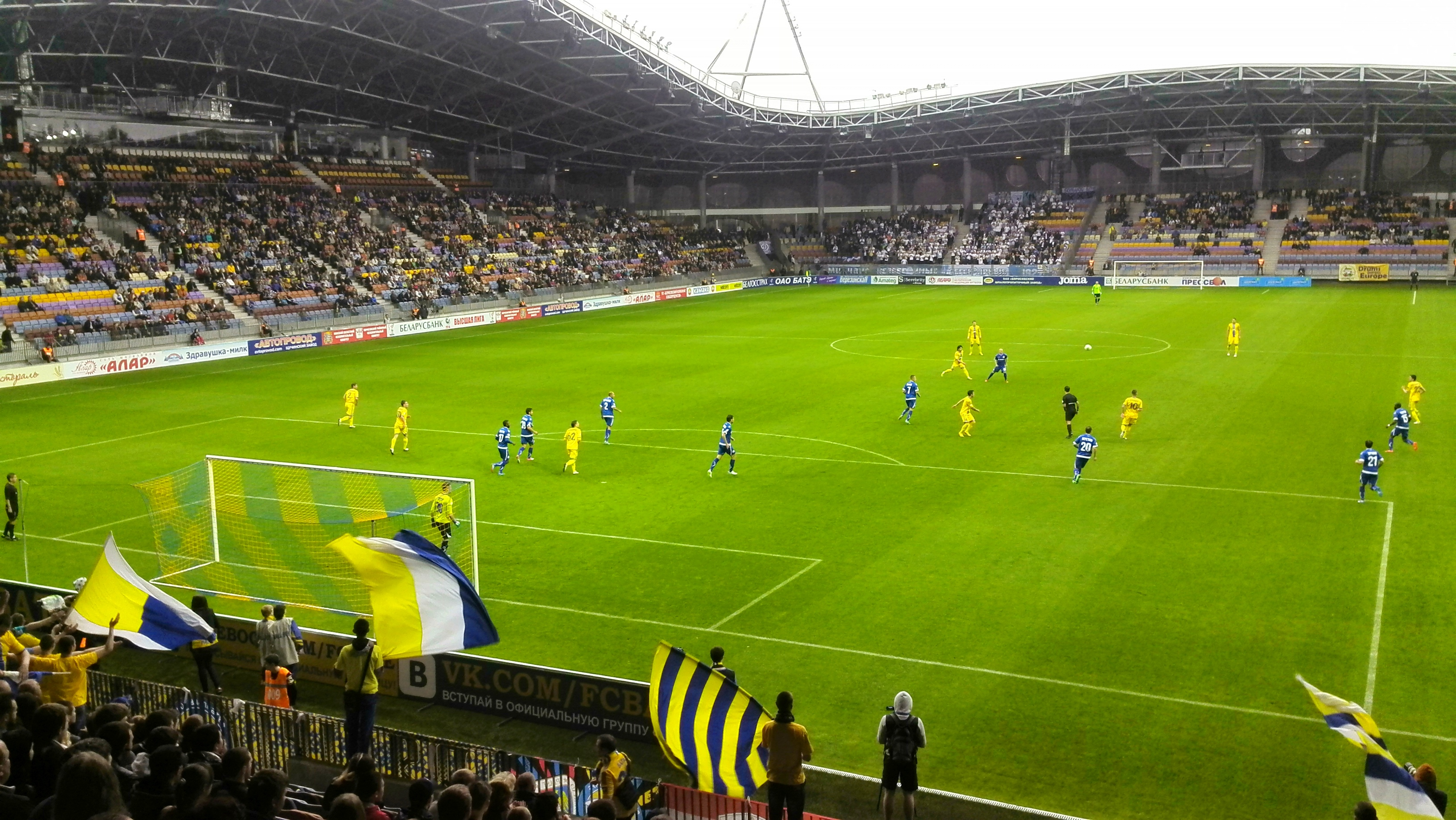 Борисов-Арена во время матча БАТЭ - Динамо (Минск), 15 мая 2014 года